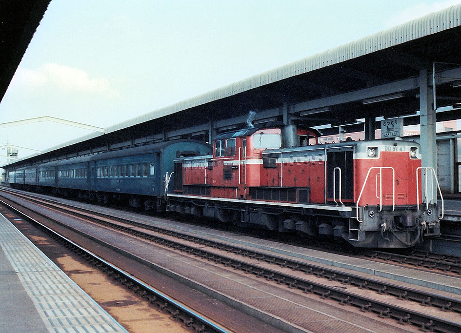 DD51 47けん引普通列車